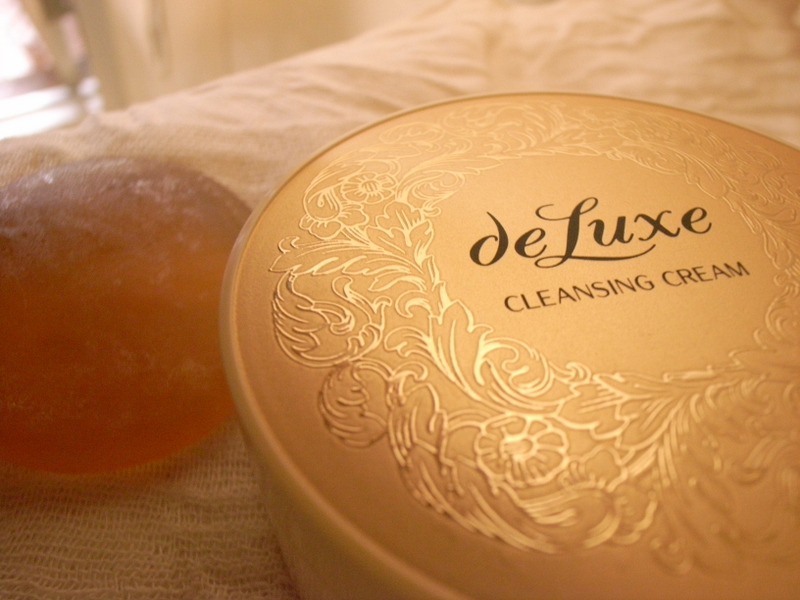 Shiseido cream